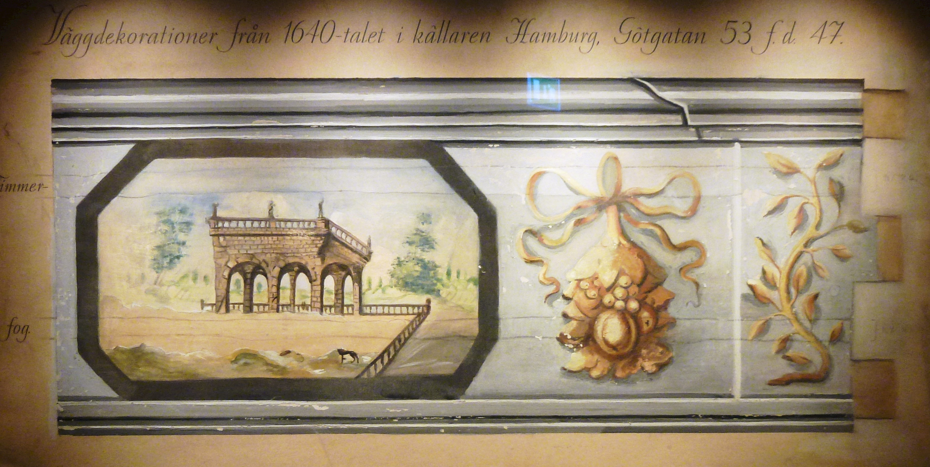 Källaren Hamburg väggdekoration 1640-tal i Stockholms stadsmuseum